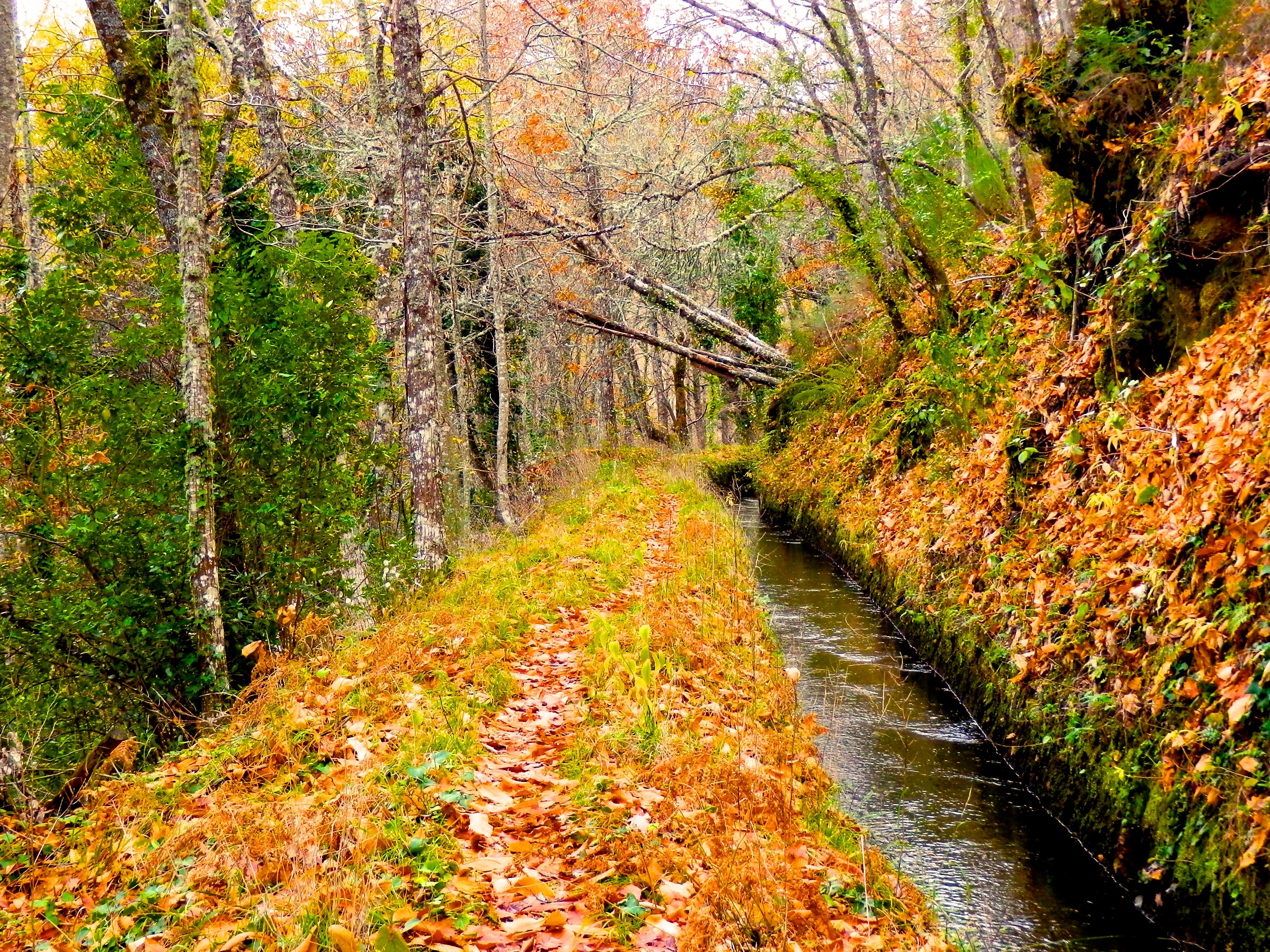 Imagen otoñal